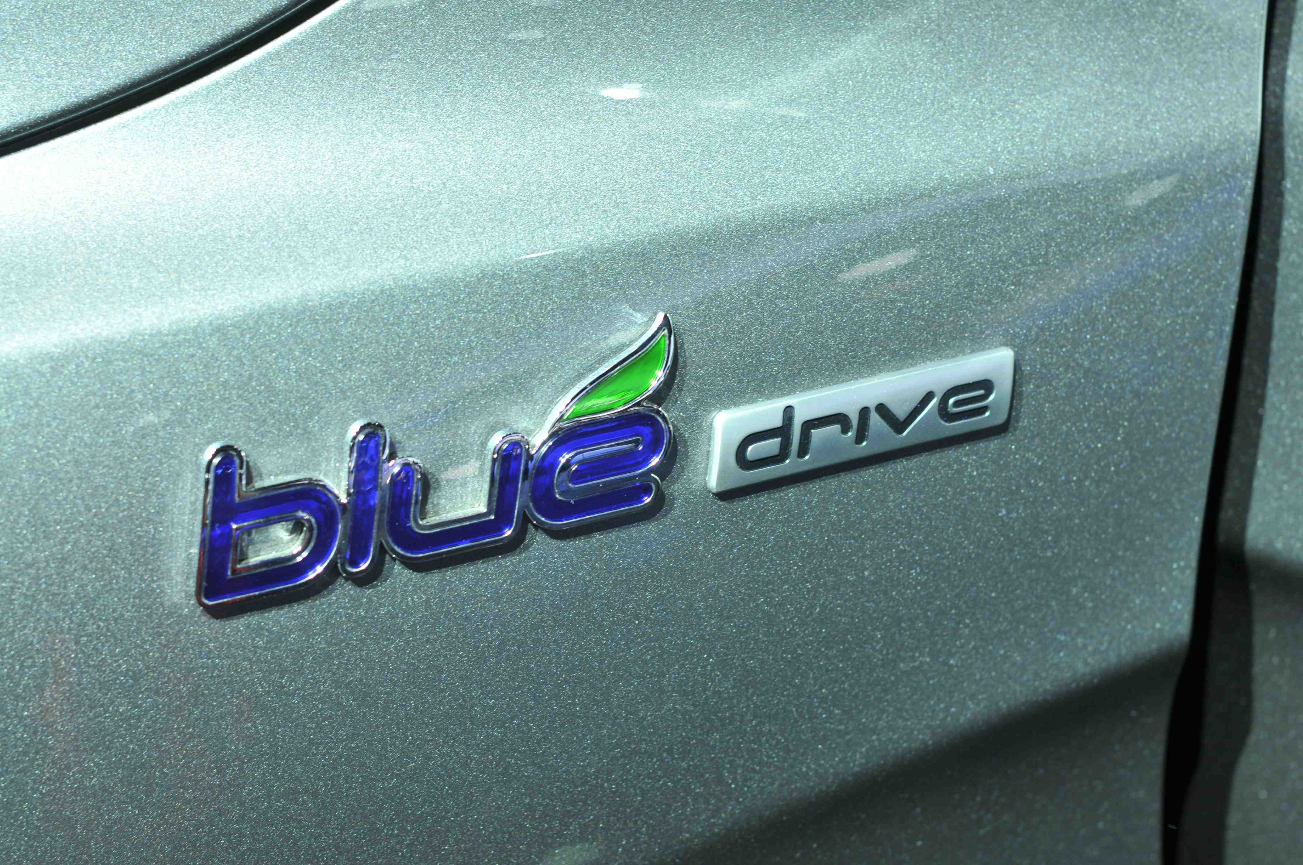 IAA 2011 - Internationale Automobilausstellung in Frankfurt/Main